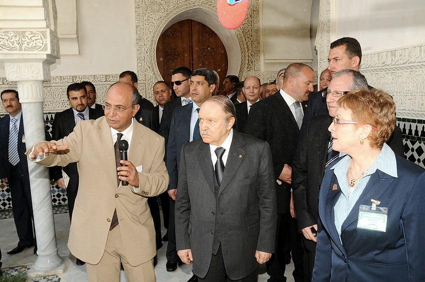 Algerian President Abdelaziz Bouteflika toured to Tlemcen. الرئيس الجزائري عبد العزيز بوتفليقة في جولة بتلمسان. Le Président algérien Abdelaziz Bouteflika en visite à Tlemcen.